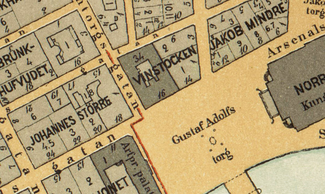 Del av 1909 års karta över Stockholm med kvarteren runt Gustaf Adolfs torg